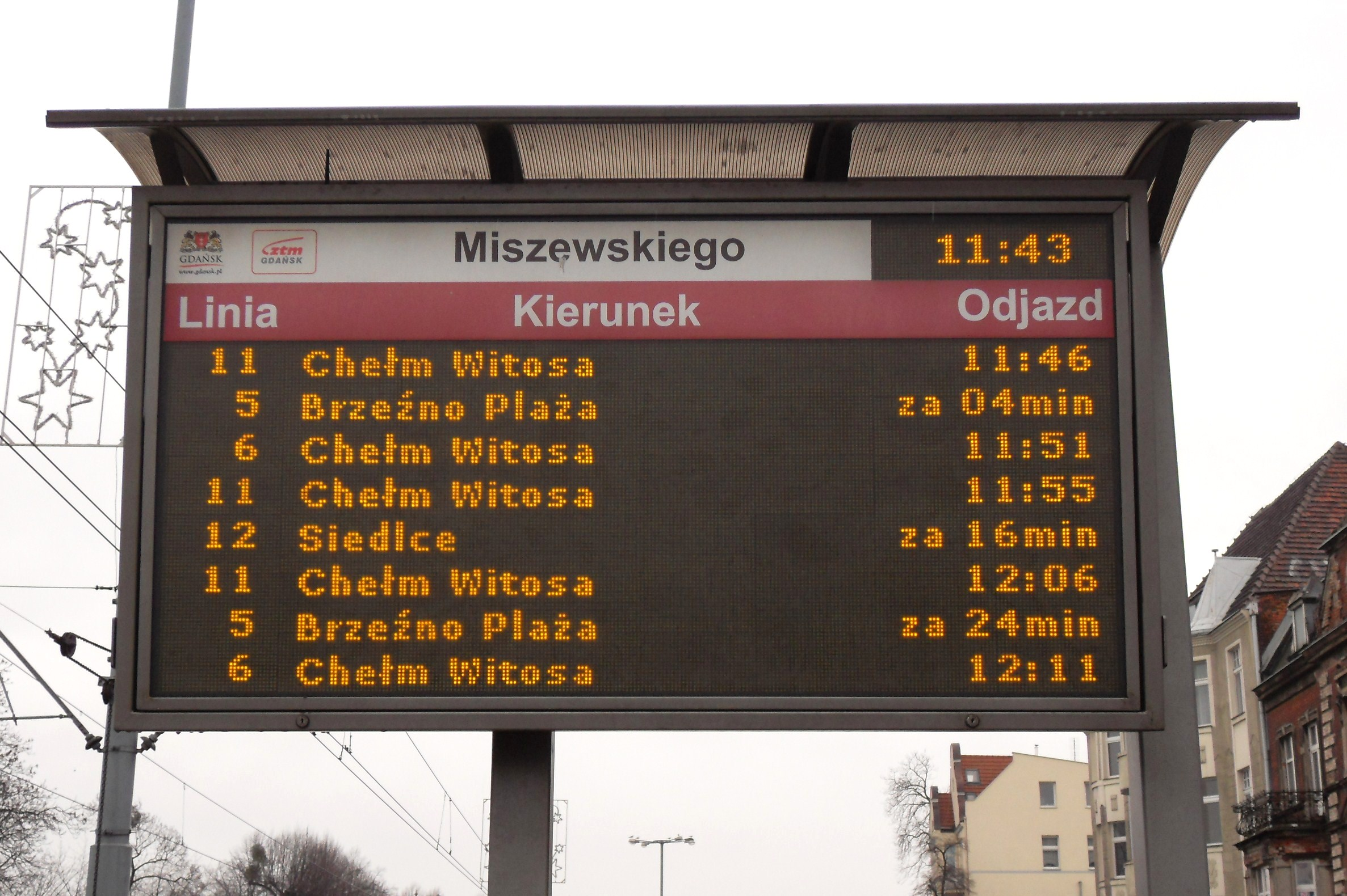 System Informacji Pasażerskiej (SIP) w Gdańsku - duży monitor diodowy (8 wierszy), przystanek tramwajowy.